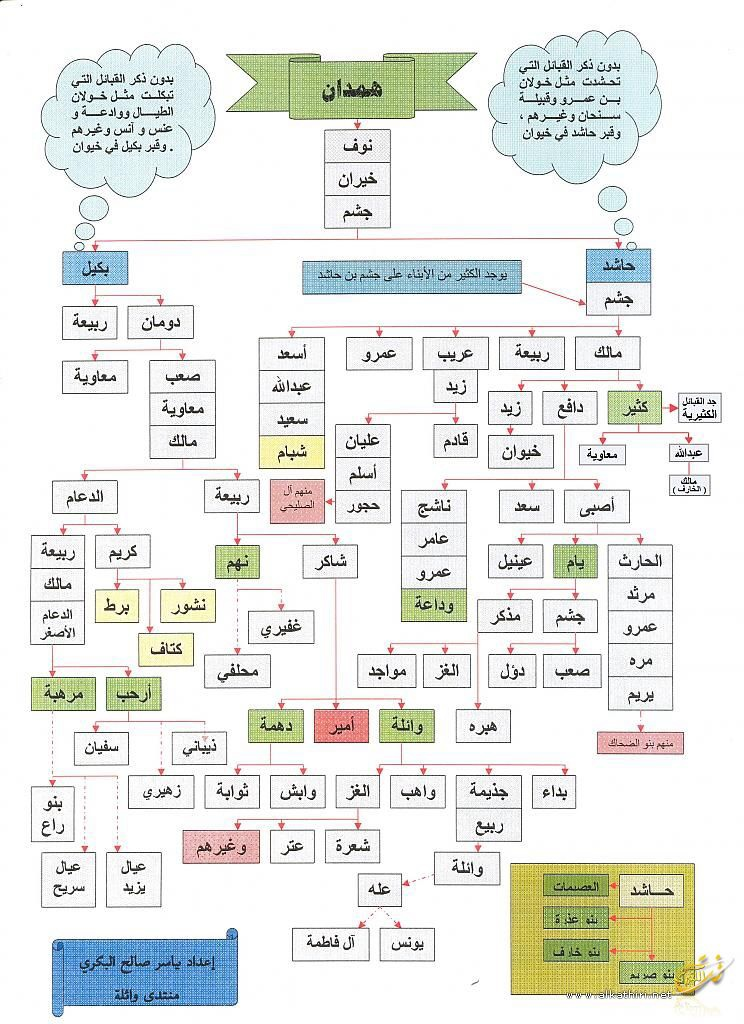 شجرة قبائل همدان قحطان